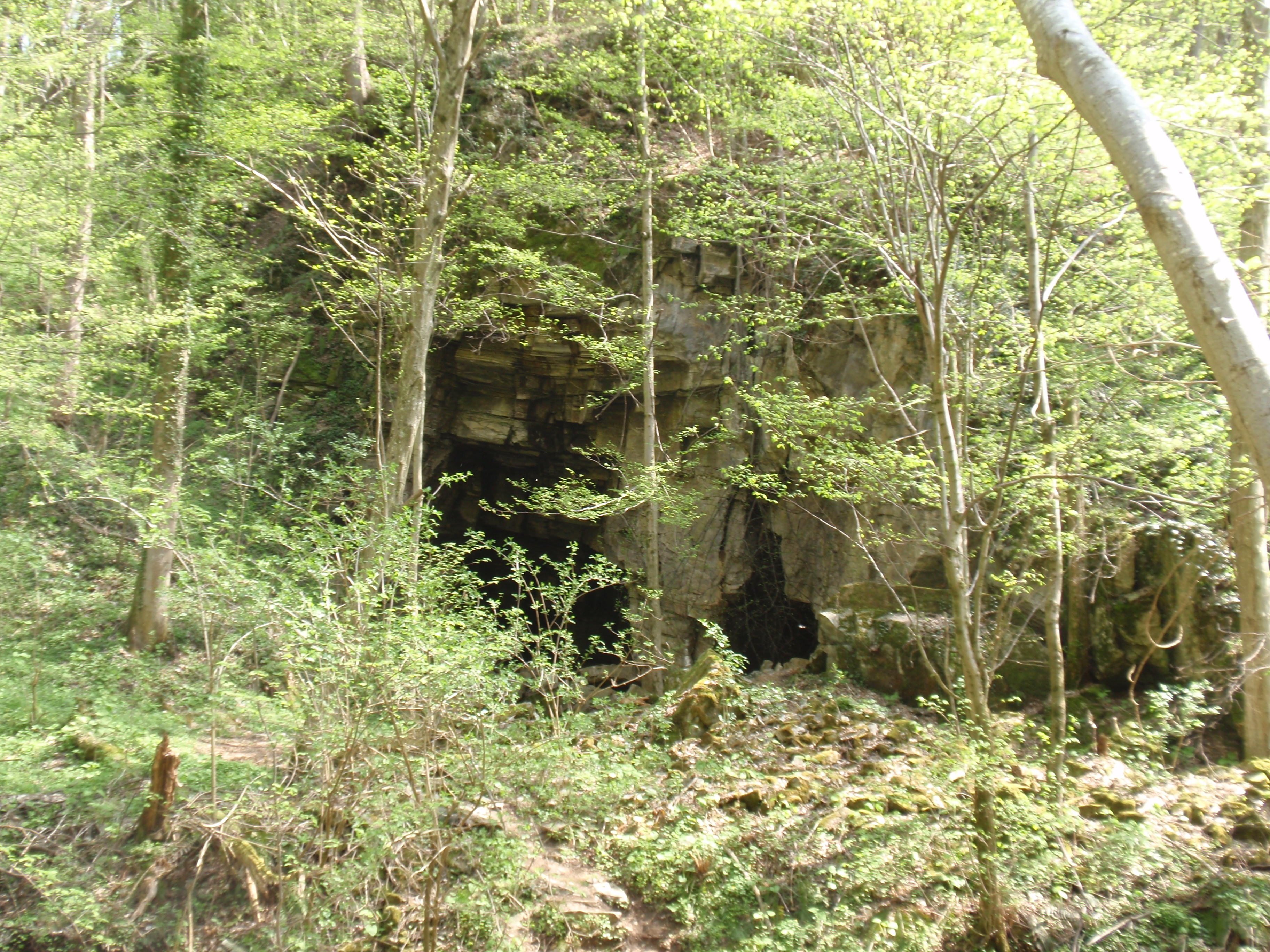 Rimski kamnolom